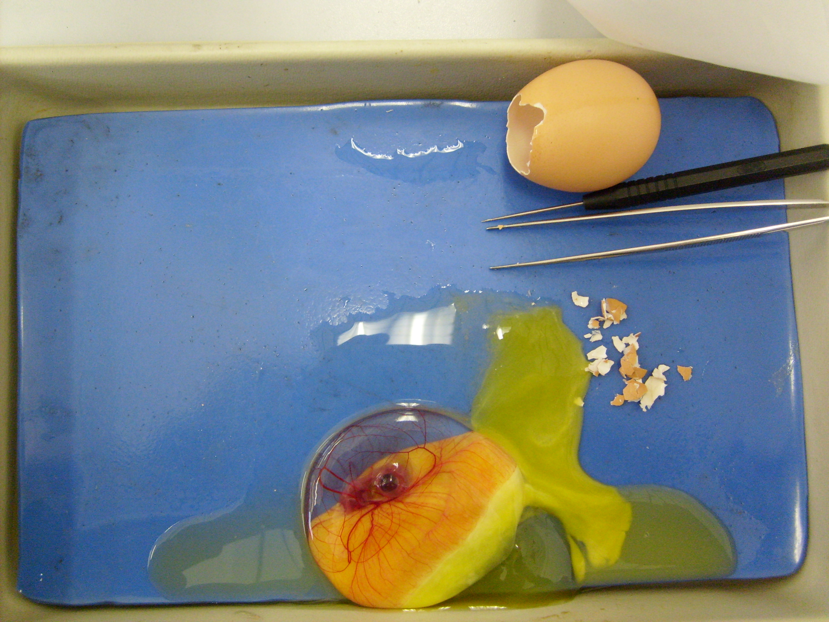 Chicken embryo, 1 week old